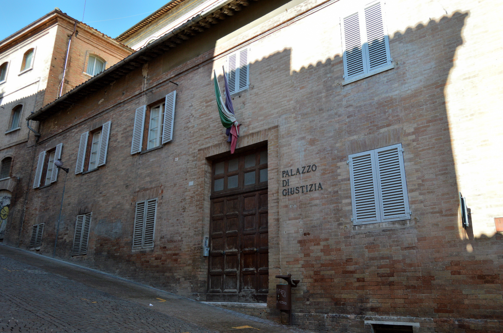 Tribunale in Via Raffaello 28 a Urbino This is a photo of a monument which is part of cultural heritage of Italy.